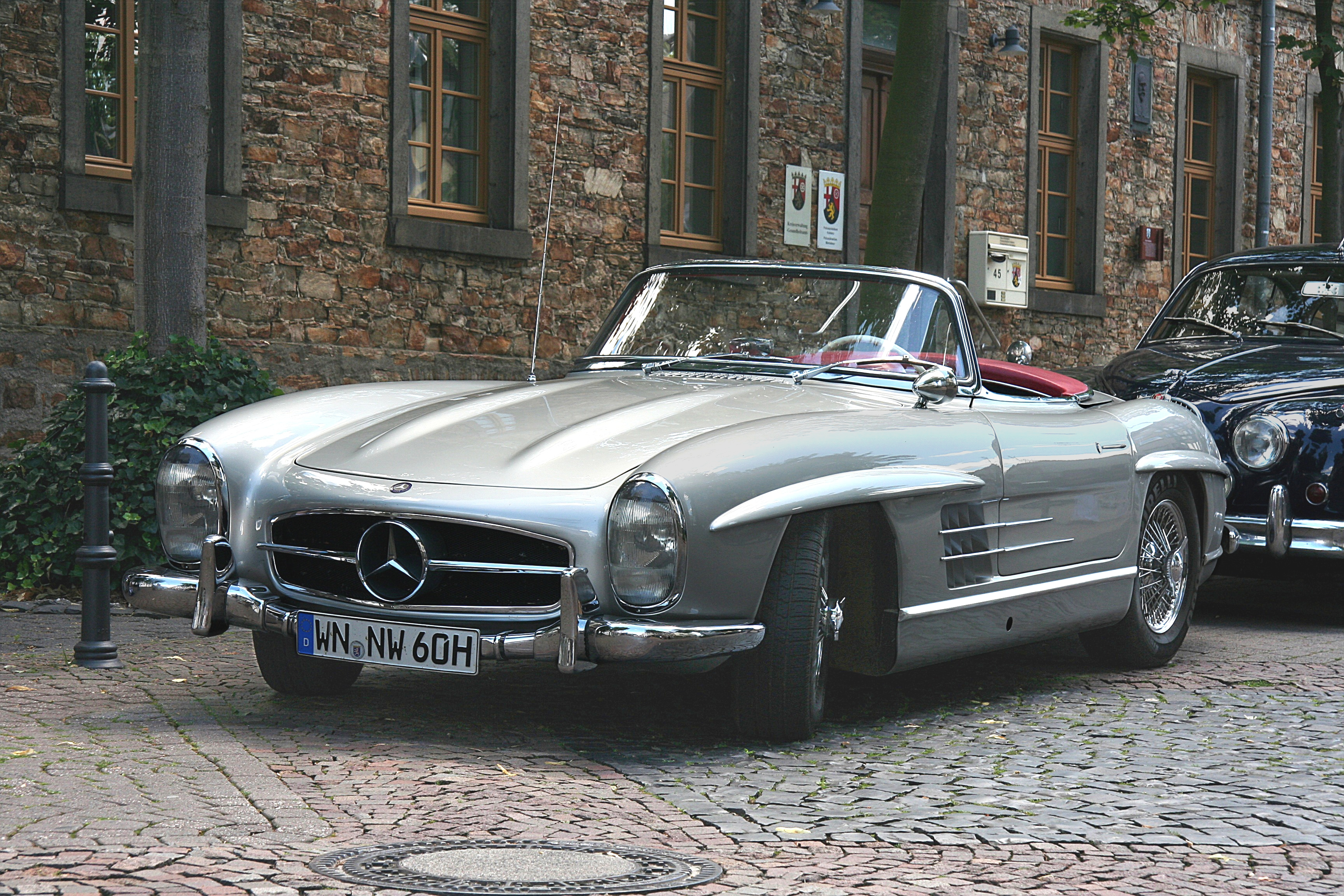 Mercedes-Benz 300 SL Roadster, Baujahr 1960 (?) bei der Oldtimerrallye „2000 km durch Deutschland“ in Montabaur; Speichenräder nicht serienmäßig (Kennzeichen fiktiv)